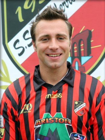 Foto del giocatore Mirko Quaresima